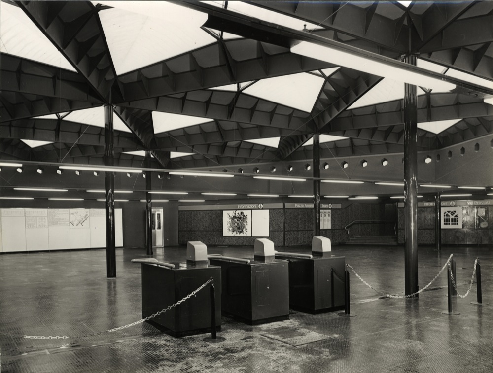 Il mezzanino della stazione di Amendola-Fiera della metropolitana di Milano, poco prima dell'apertura.